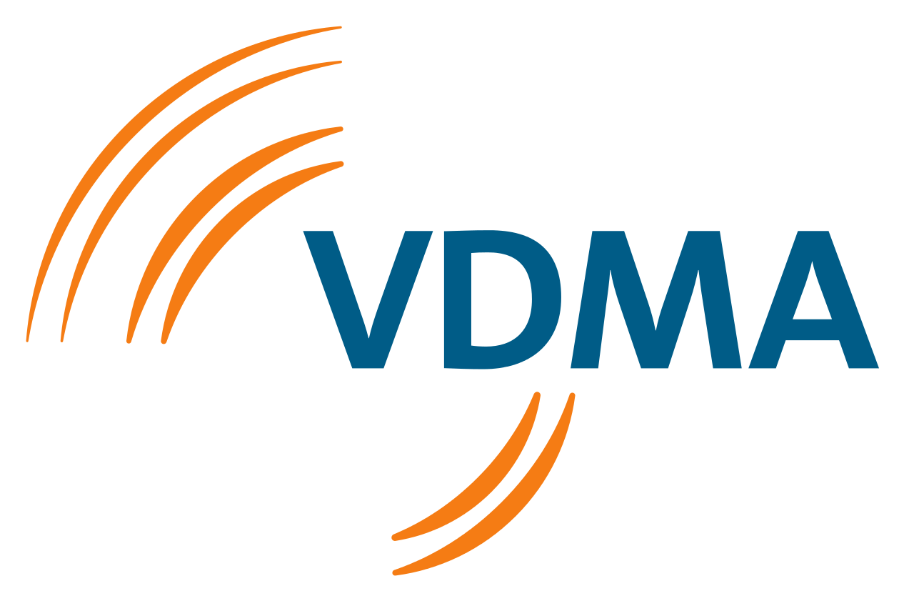 Логотип VDMA